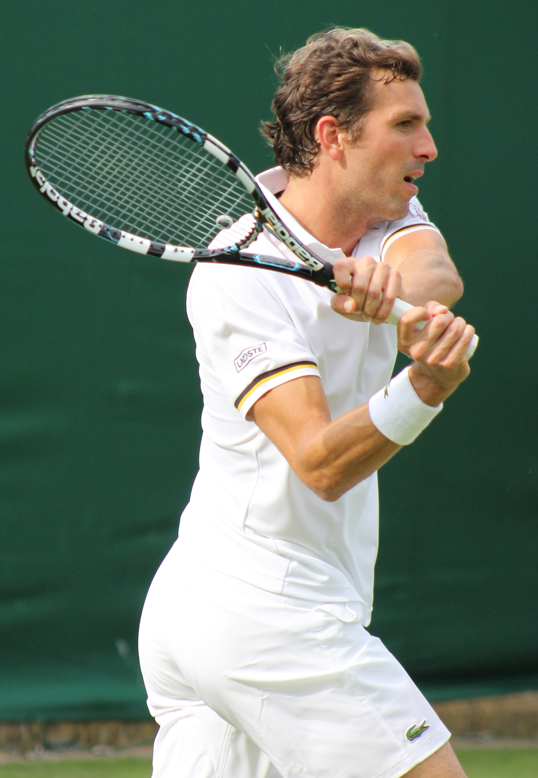 Benneteau WM13-002